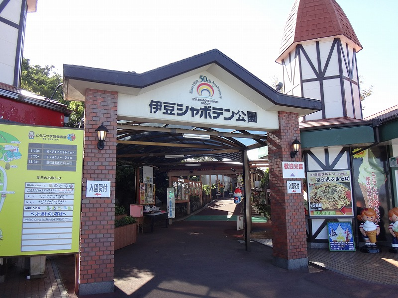 伊豆シャボテン公園